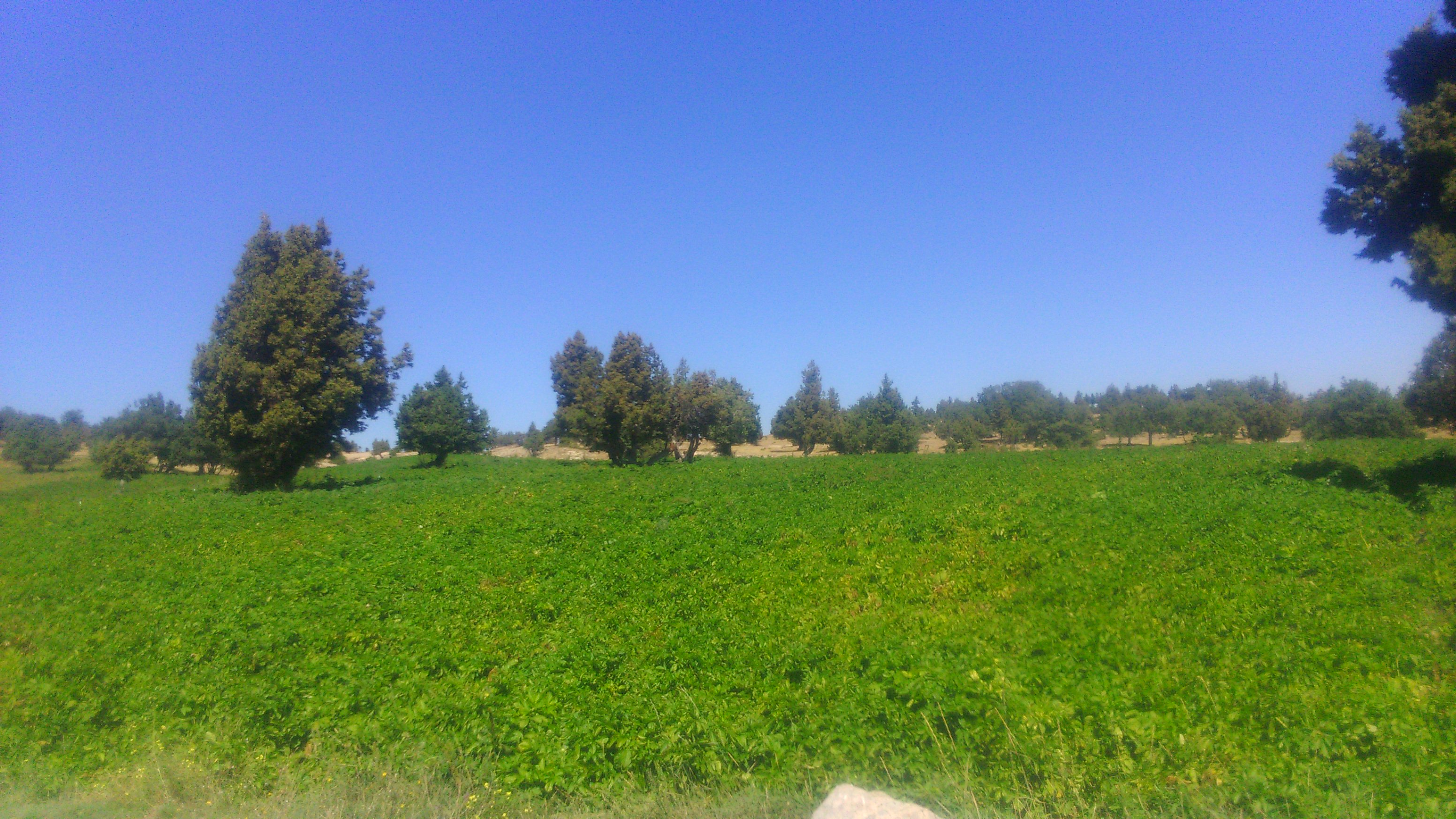 Bozköy'de bir patates tarlası